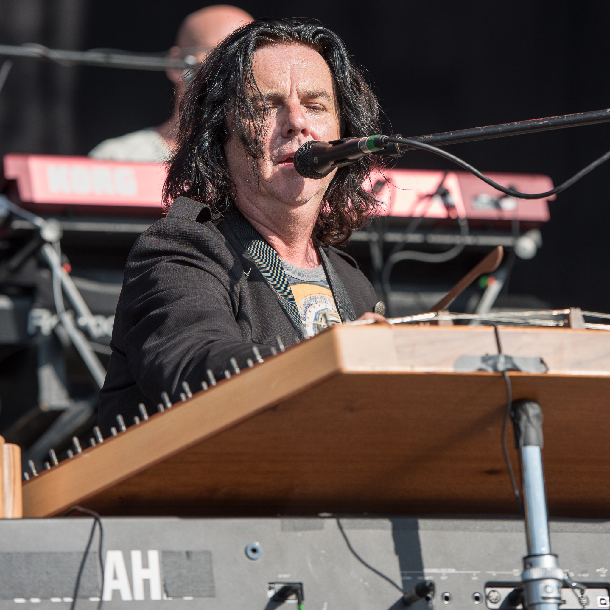 Brombachsee,Concertbüro Franken,Festival,Konzert,Lieder am See,Livekonzert,Livemusik,Marillion,Musik,Steve Hogarth